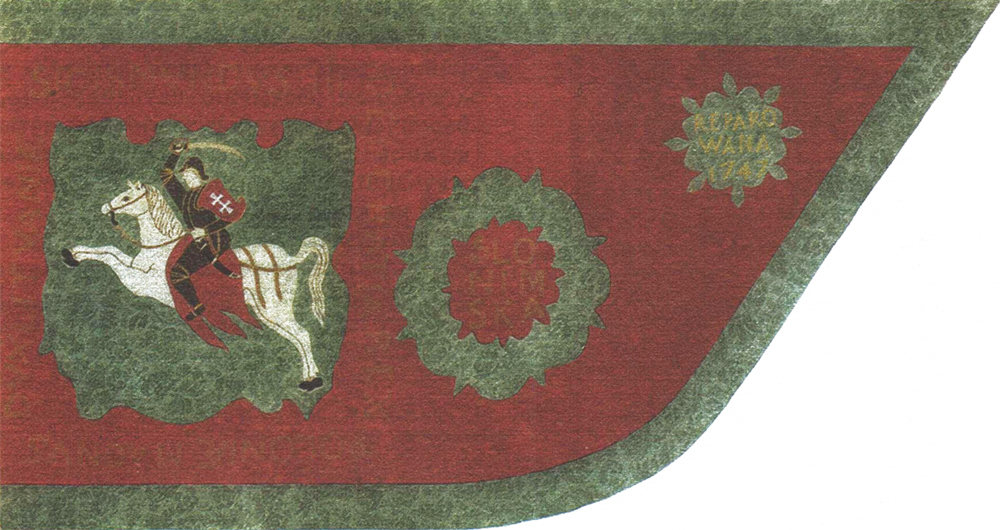 Беларуская (тарашкевіца): Харугва паспалітага рушаньня Слонімскага павету (Słonim) з Пагоняй («Pahonia»)